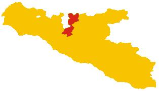 Bivona nella provincia di Agrigento